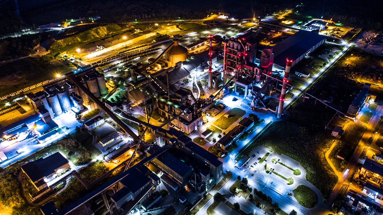 Cementownia Ożarów w Karsach 2019